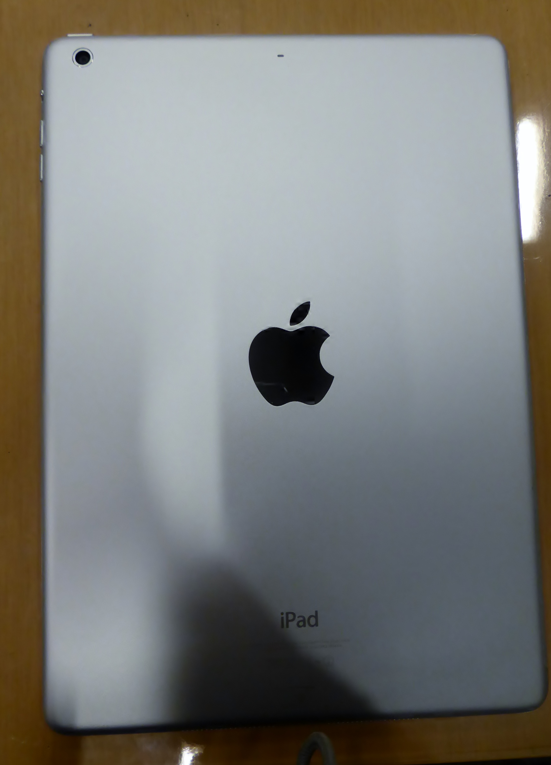 iPad Air の裏面を撮影。